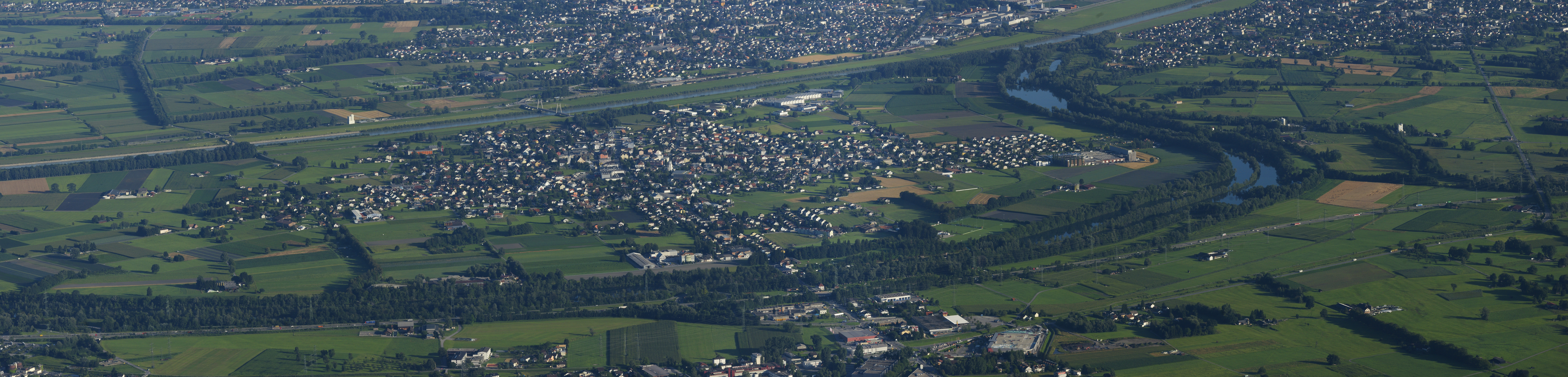 6 Uhr 30, Morgenpanorama vom Gipfel der Hohen Kugel 1645m, ob Götzis auf Diepoldsau, eingebettet zwischen dem neuen und alten Alpenrhein.